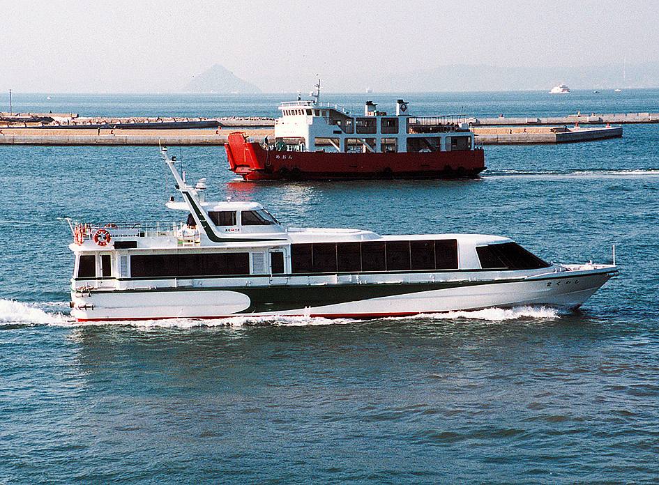 関西急行フェリー 高松－土庄航路高速艇 しわく2